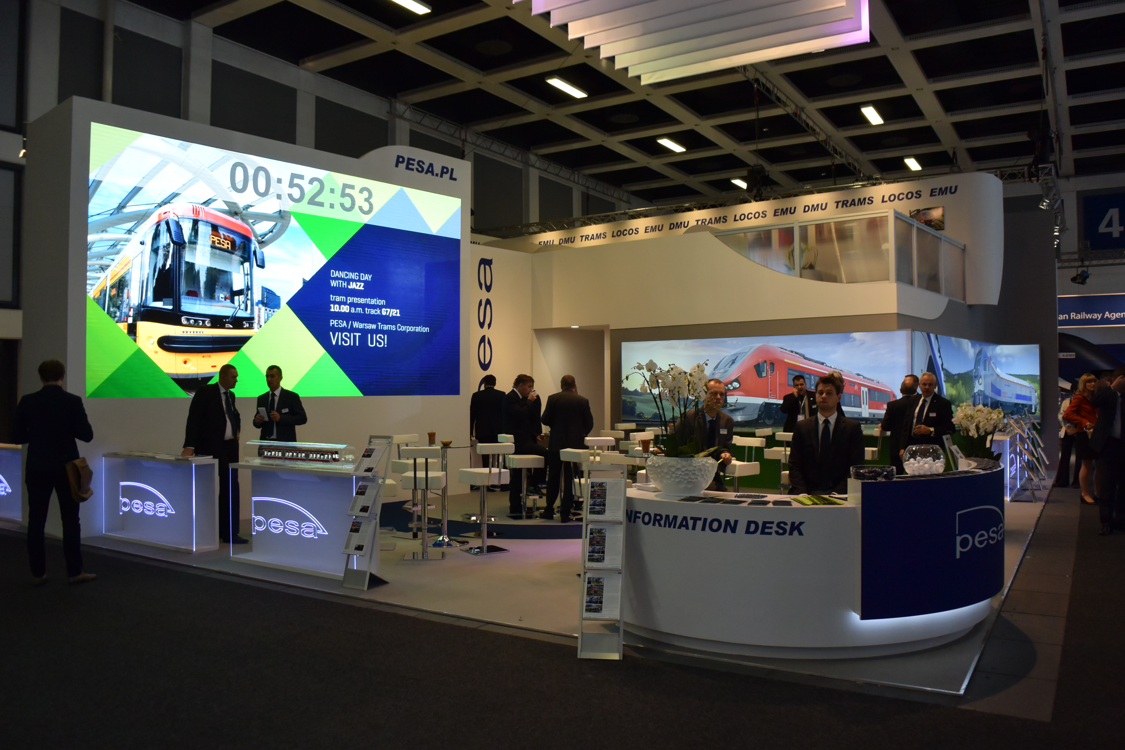 Stoisko PESA SA podczas InnoTrans 2014